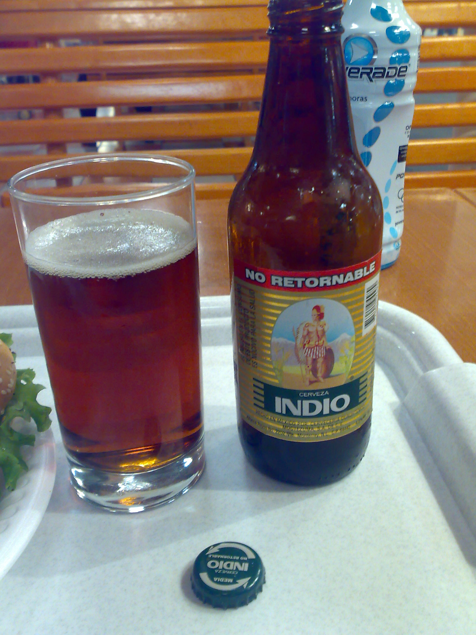 Det meksikanske ølmerket Indio. Bildet er tatt i Mexico by